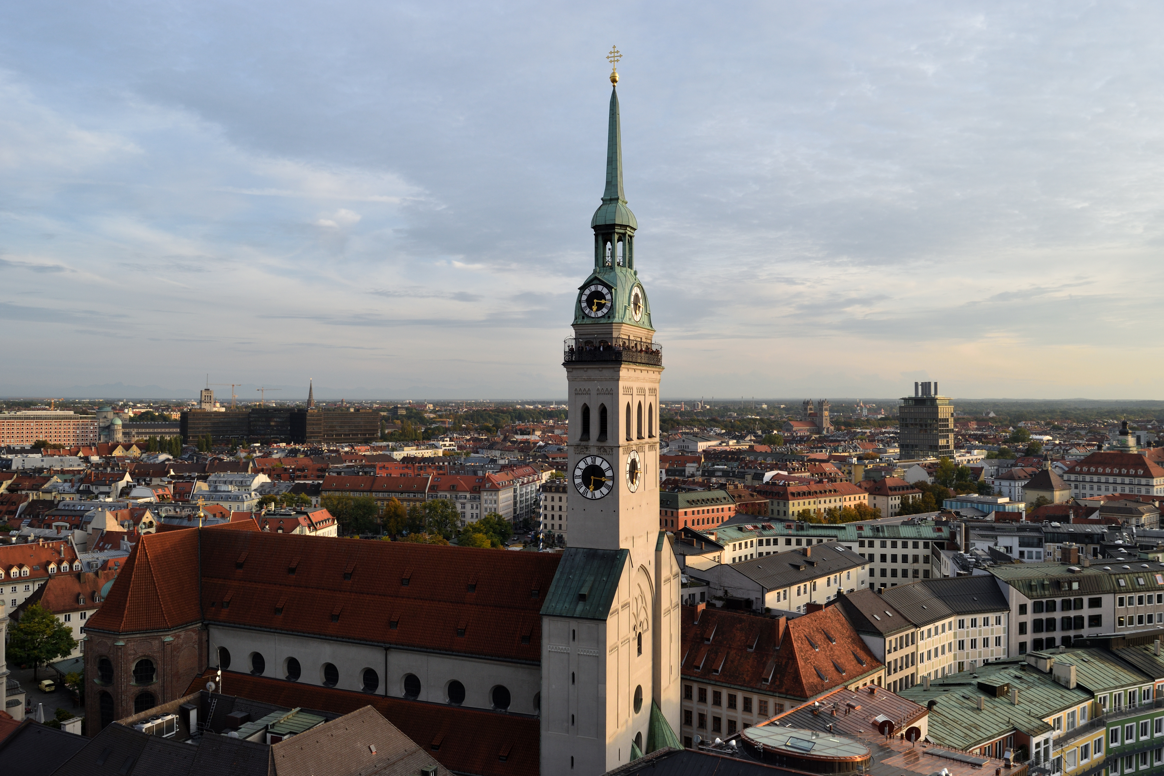 München - Blick vom Neuen Rathausturm zu St. Peter - September 2017This is a photograph of an architectural monument.